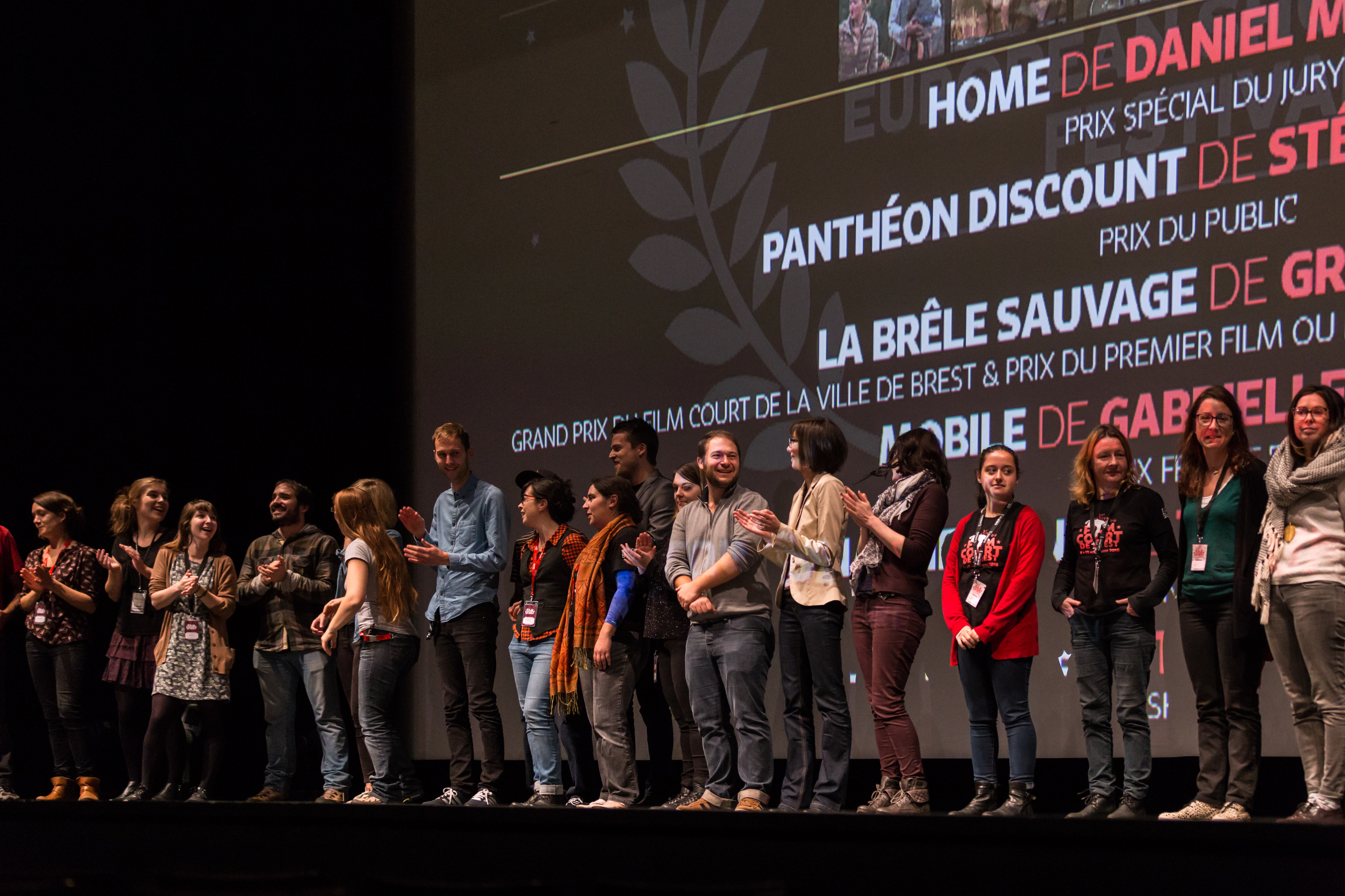 Une partie de l'association Cote Ouest et de l'organisation du festival européen du film court de Brest lors de la dernière séance le dimanche 13 novembre 2016.